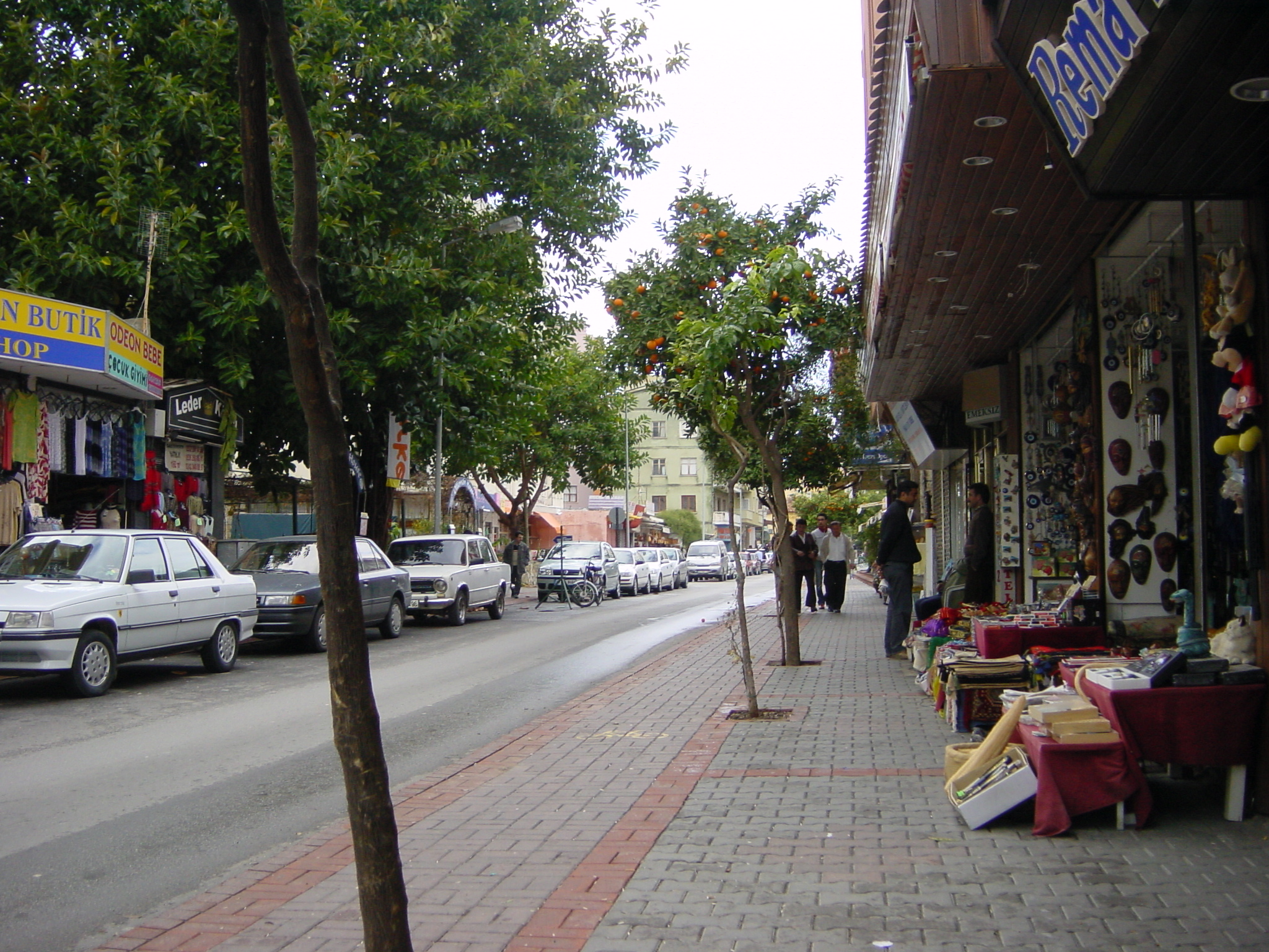 2003-12-28 01-04 T�rkei 186 Alanya